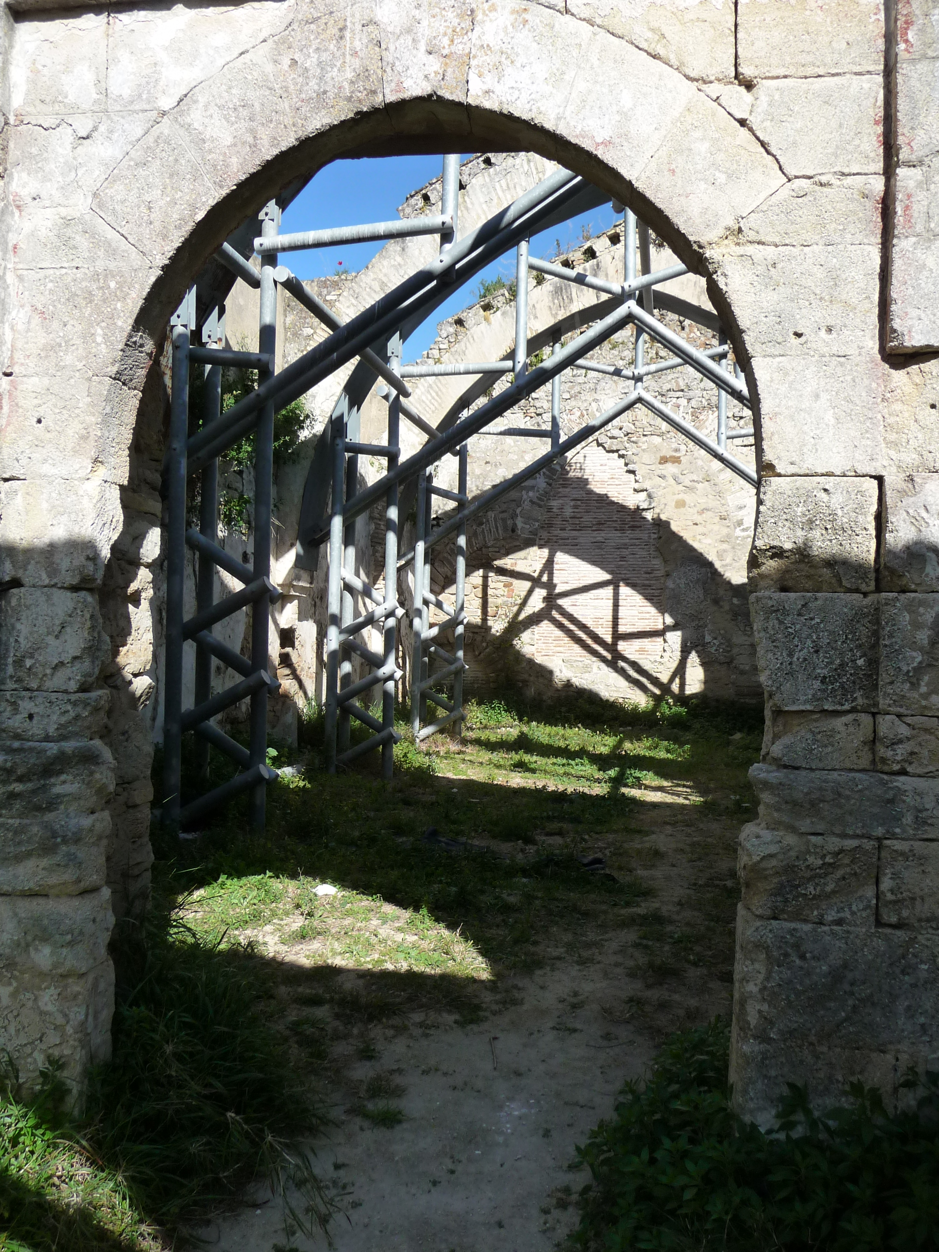 ErmitaSanAmbrosio-PaleoCristiana-Barbate-p1020186.jpg